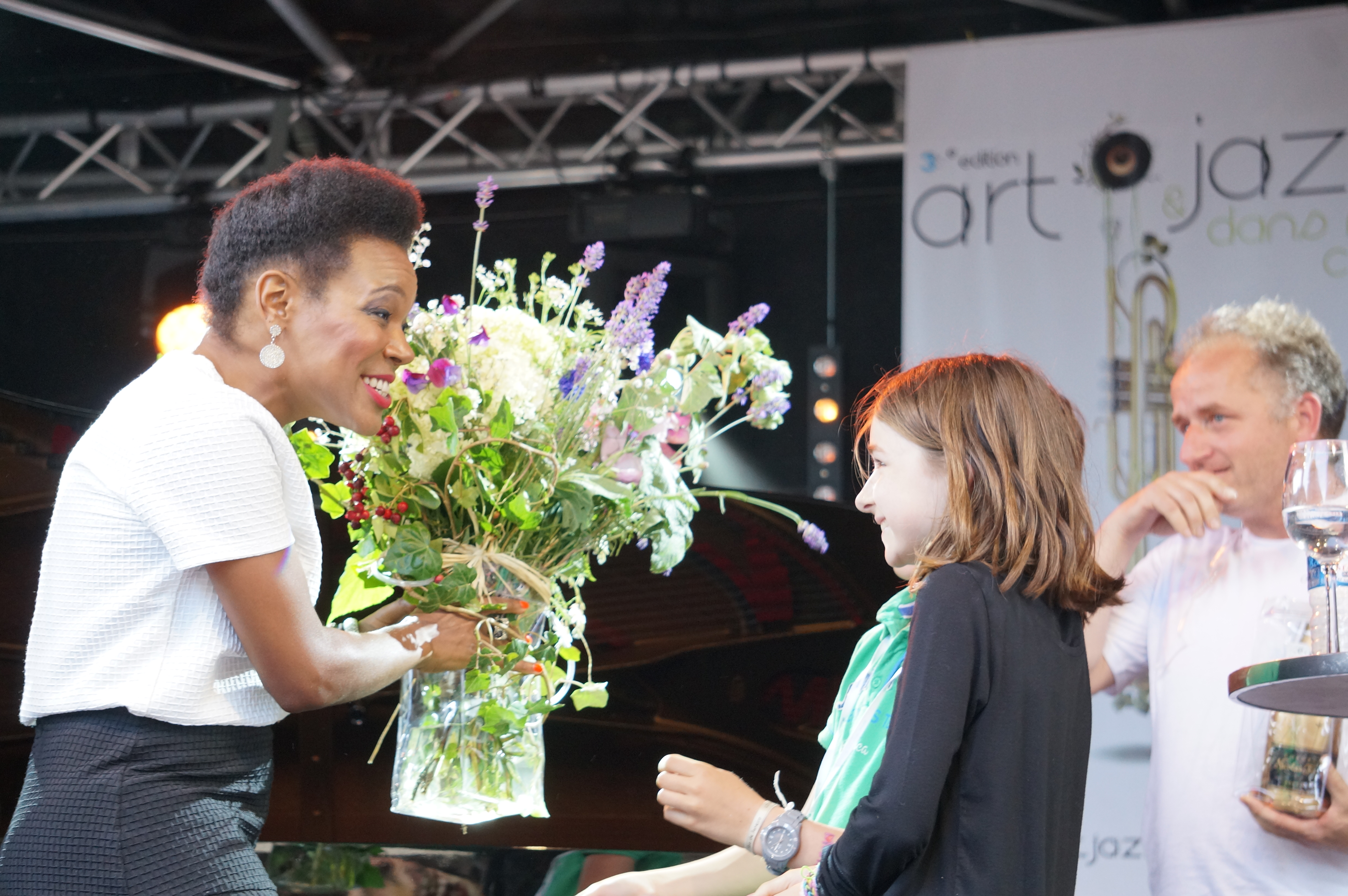 Concert lors de Art & Jazz 2014.